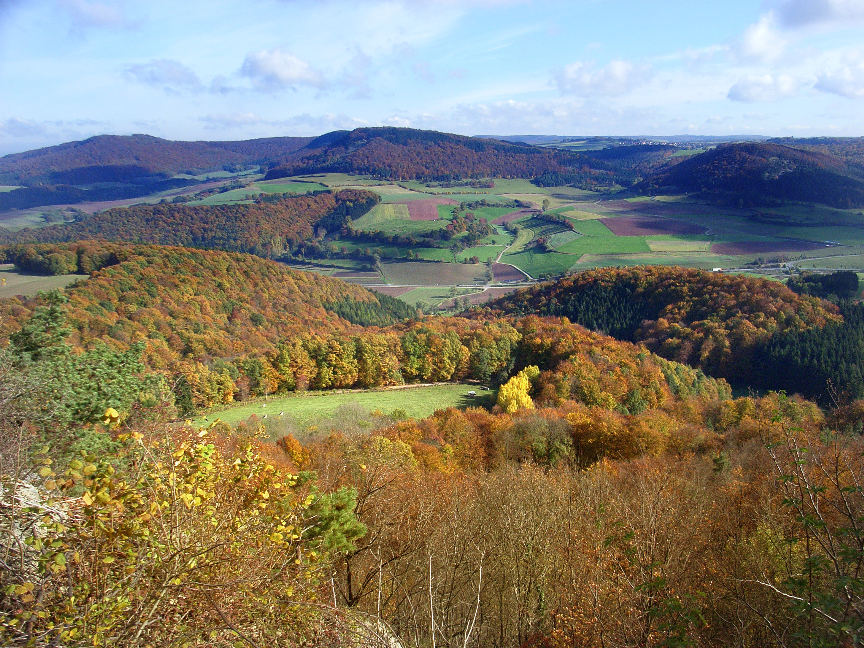 Herbst im hessischen Werra-Meißner-Kreis: Blick vom Holstein (Berg zwischen Weißenborn und Breitau in Sontra) in nordöstliche Richtung auf Boyneburg, Schickeberg und Erbberg (im Hintergrund v. l.); Teile der drei Erhebungen liegen im Naturschutzgebiet „Boyneburg und Schickeberg bei Breitau“.